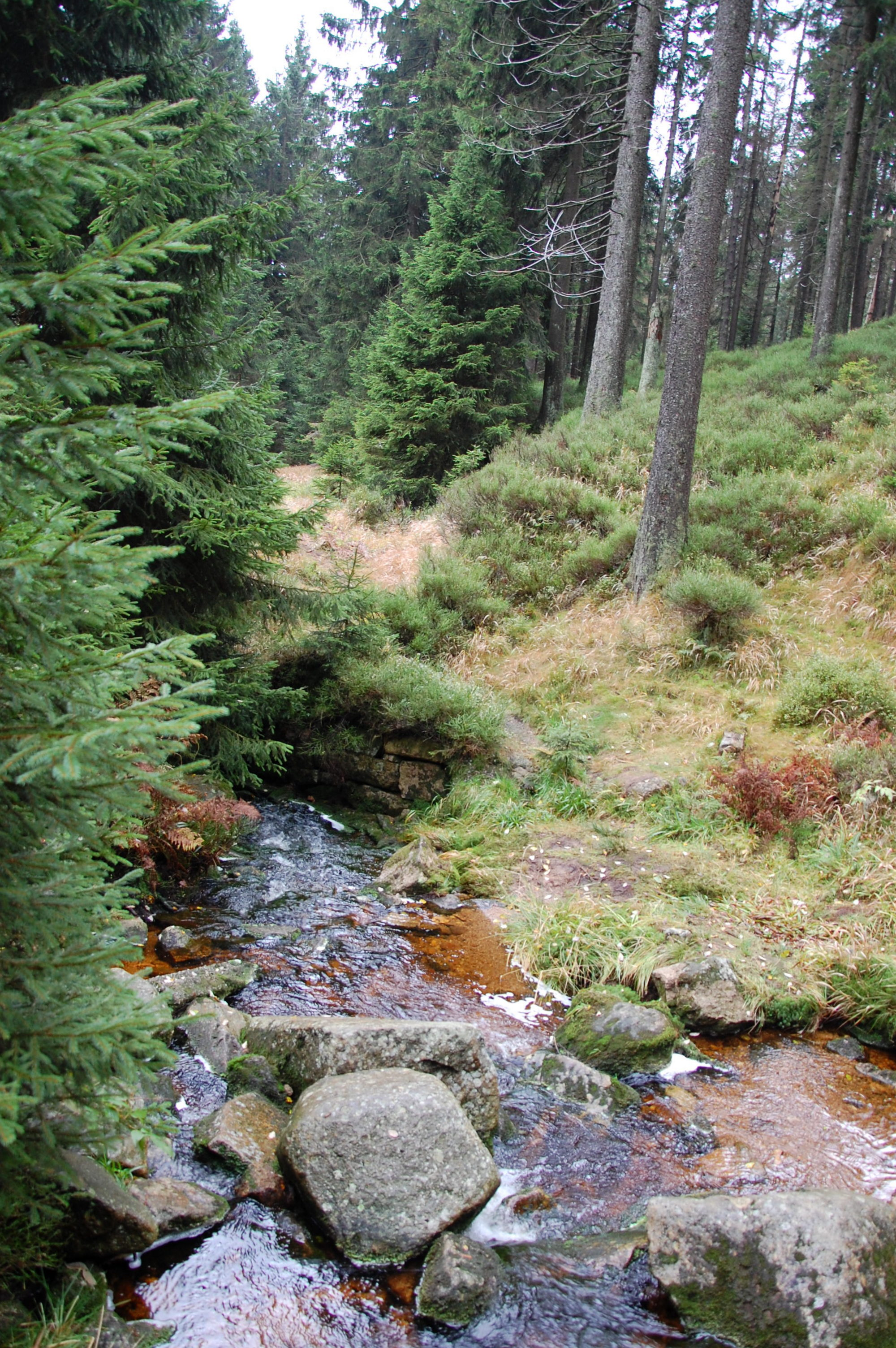 Bach im Eckerloch (Schwarze Schluftwasser oder einer ihrer Nebenbäche)